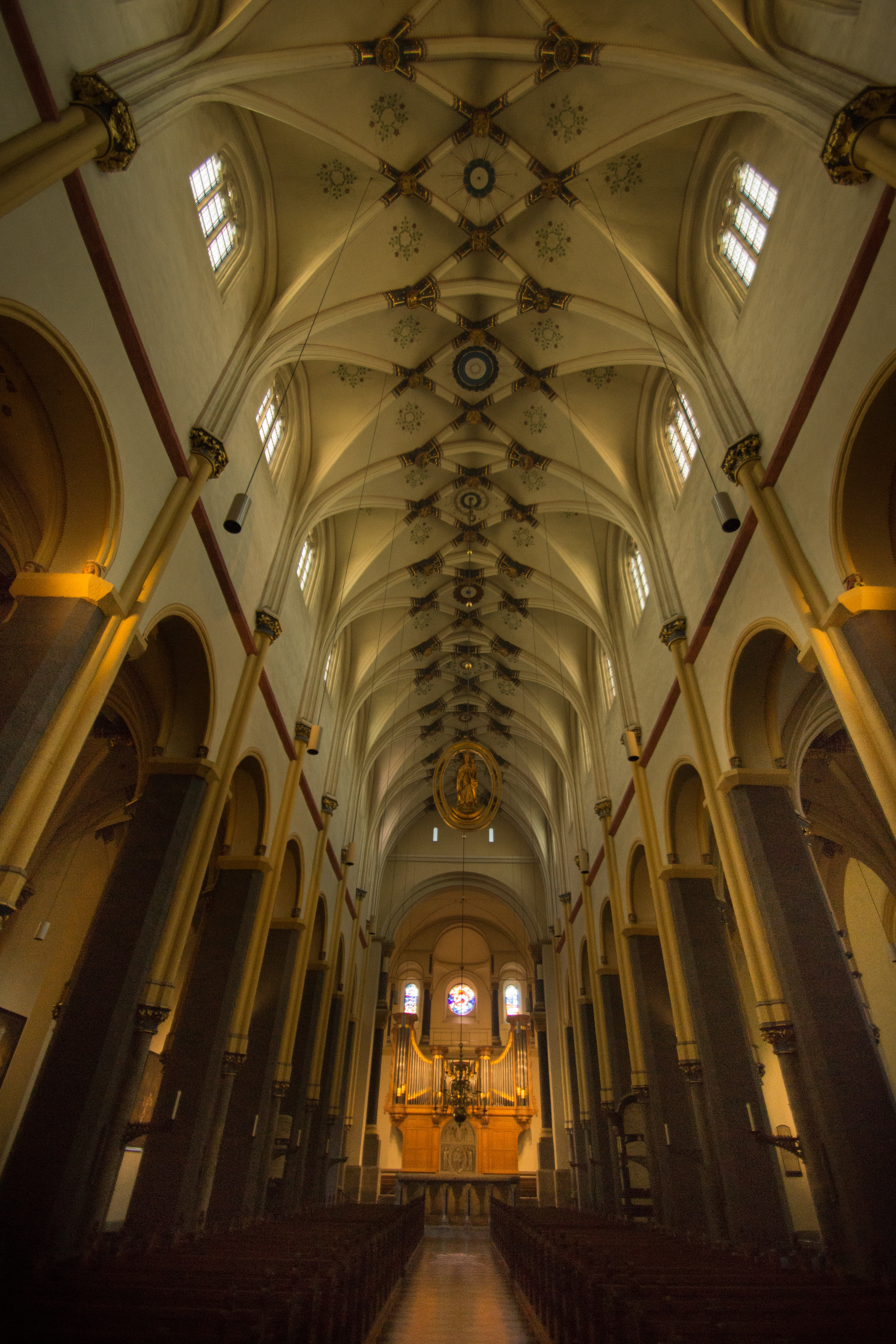 Sint-Servaasbasiliek (Maastricht)